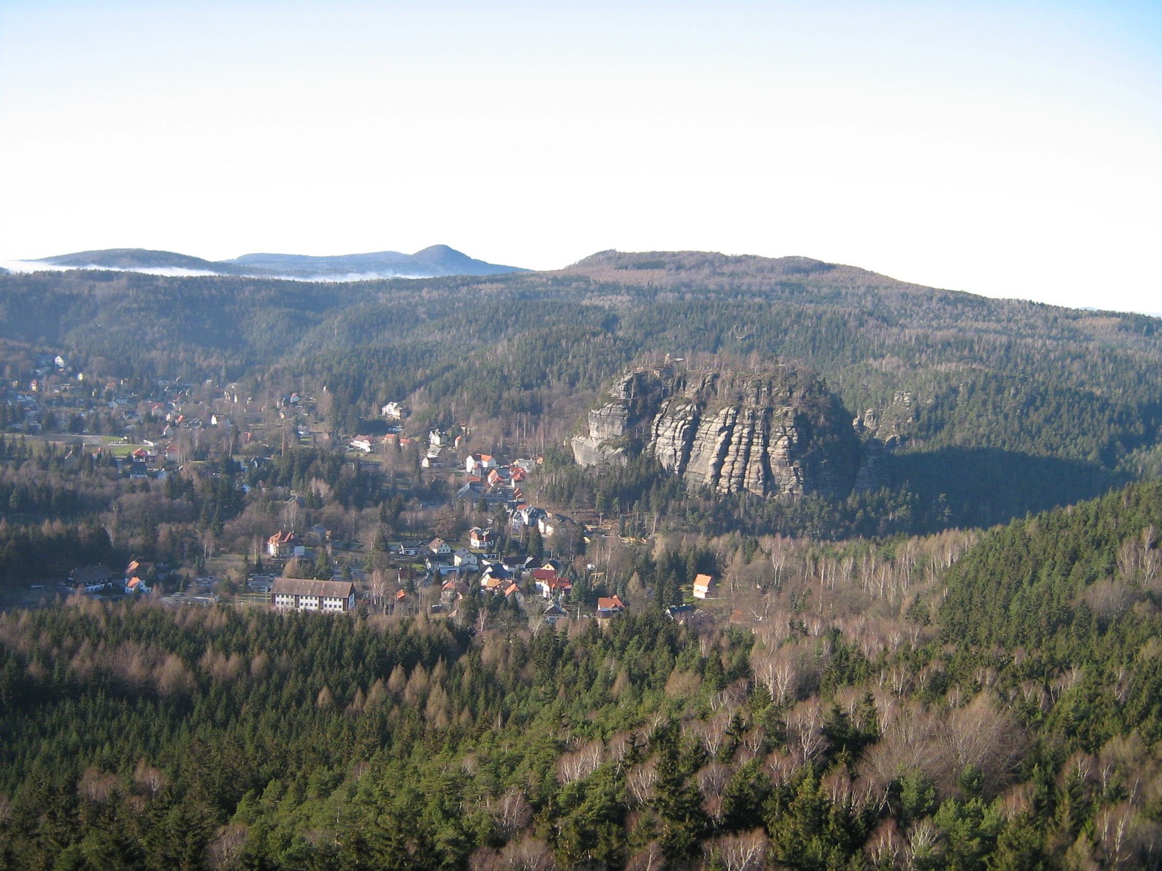 Der Berg Oybin und Ort Oybin im Zittauer Gebirge